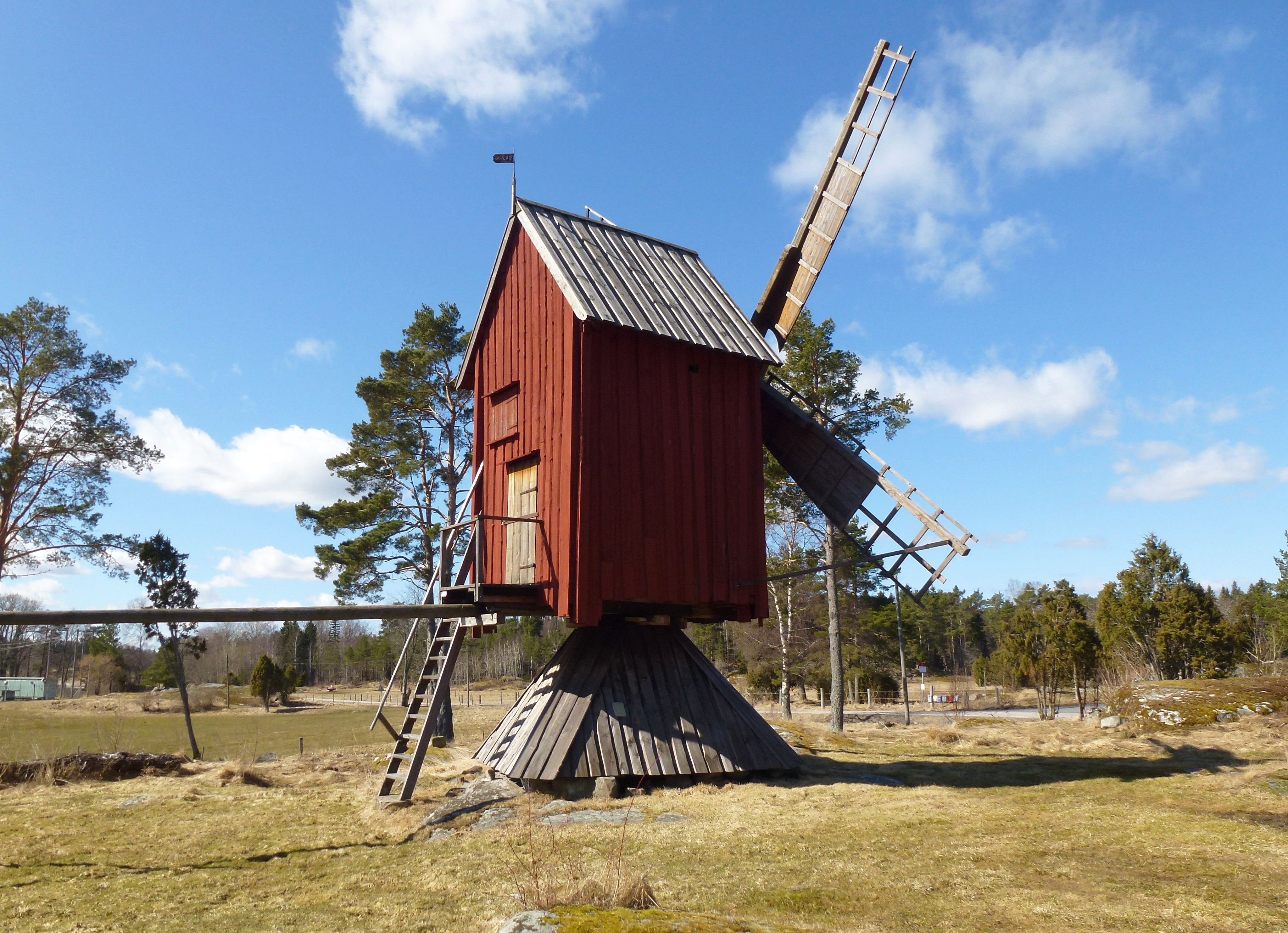 Marum väderkvarn, RAÄ-nummer Björkö-Arholma 8:1